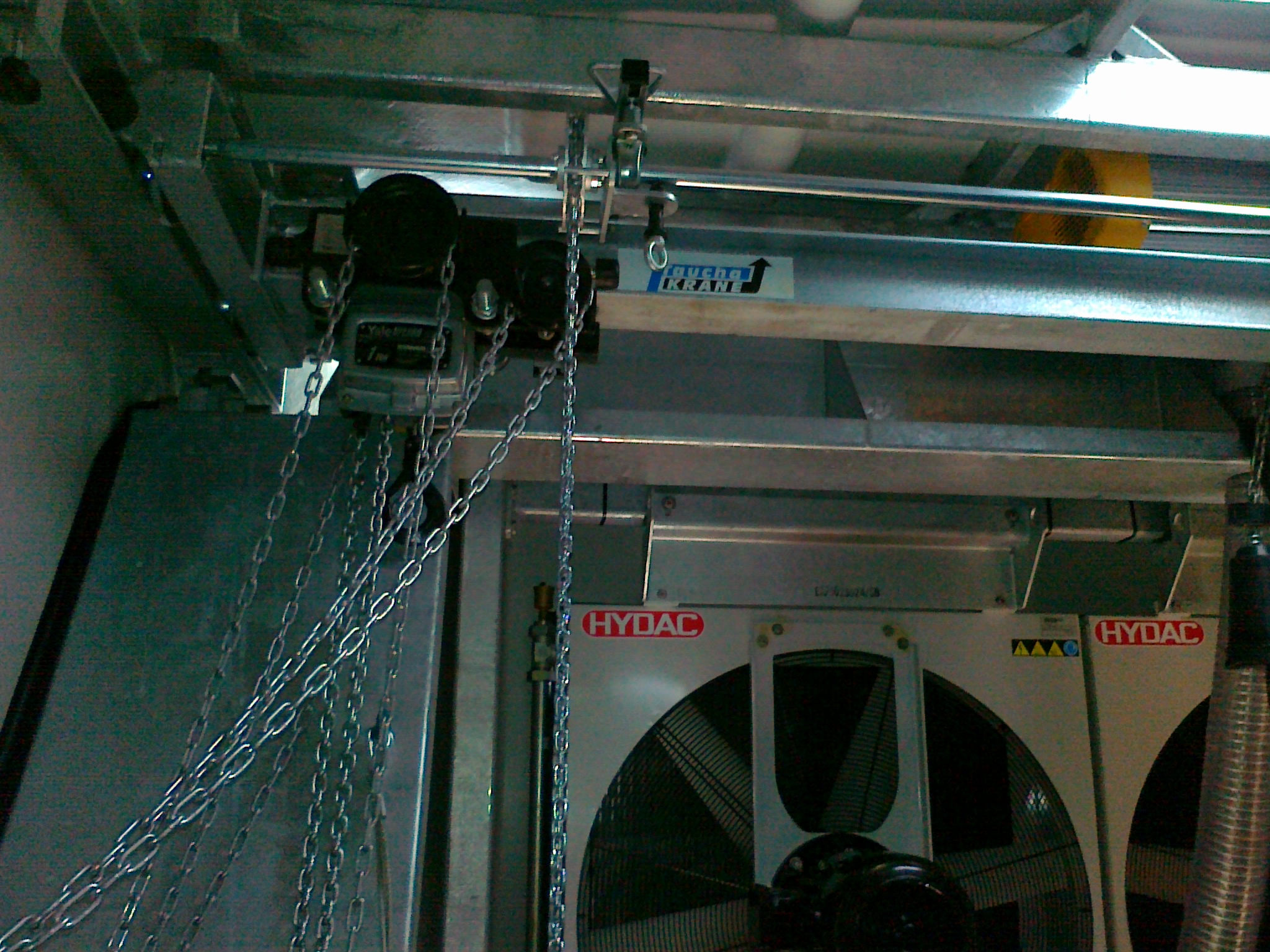 பாரம் தூக்கி